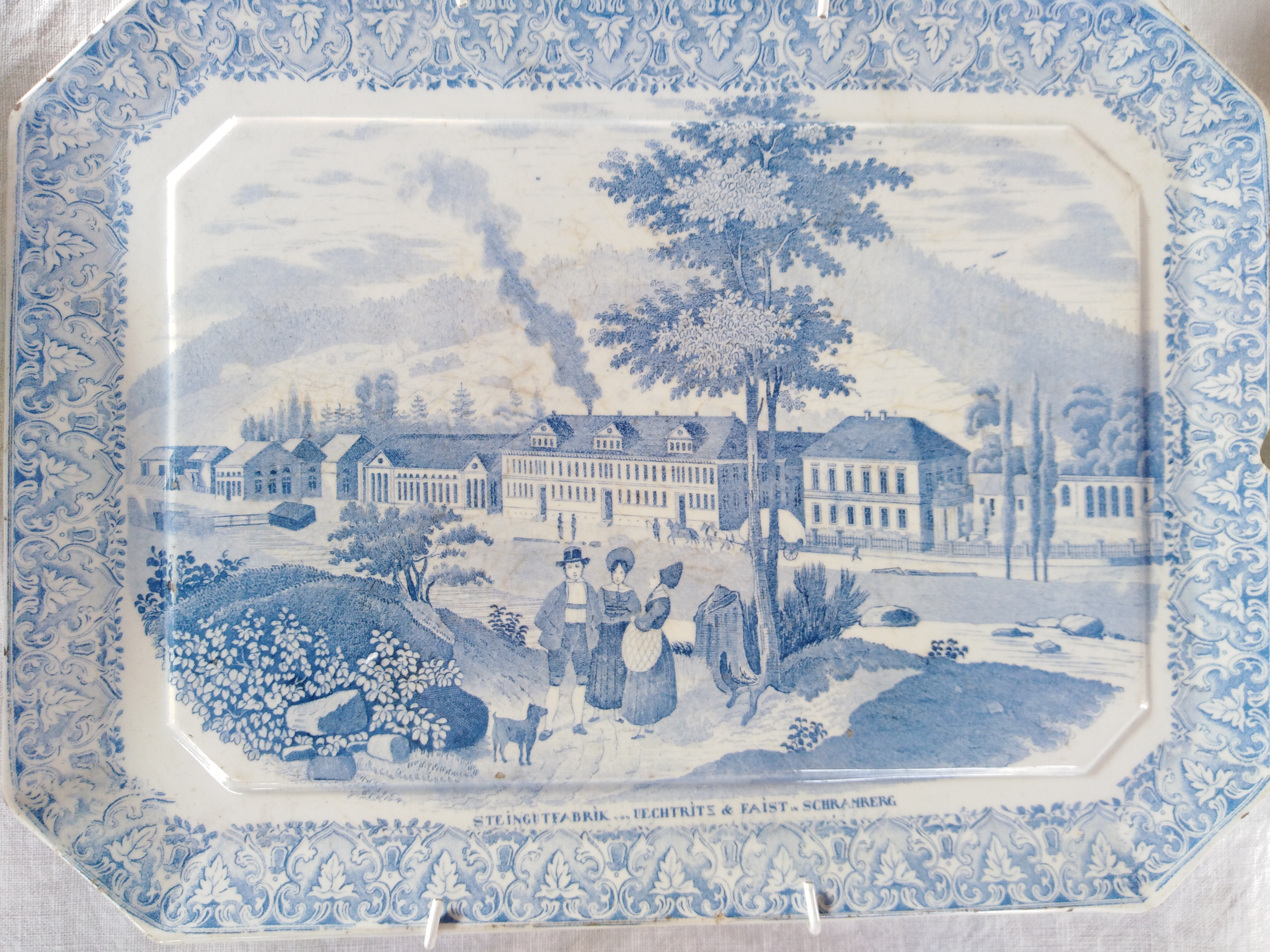 Steingutfabrik Uetrichtz & Faist Schramberg, Ansicht auf Umdruckgeschirr um 1830